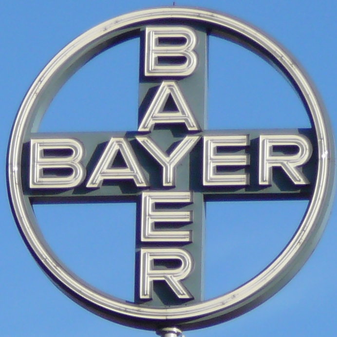 Friedrich-Ebert-Str., Wuppertal